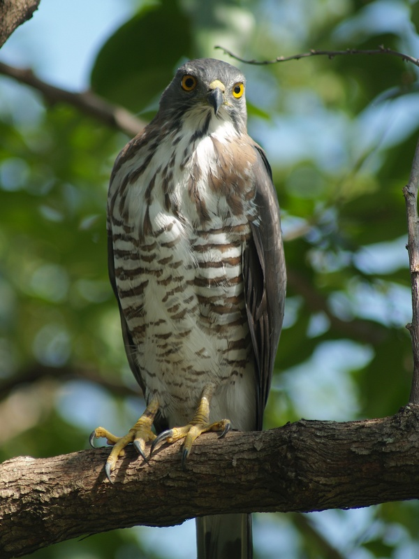 Accipiter trivirgatus 鳳頭蒼鷹